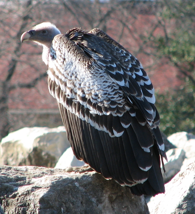 Rupell's Griffon Vulture (Gyps rueppellii)